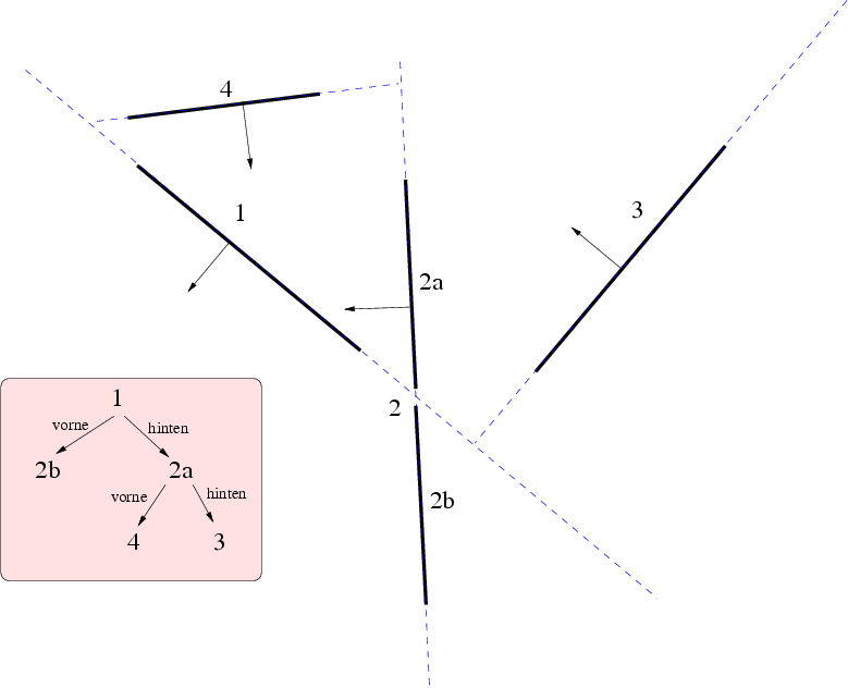 Ein Beispiel für Binary Space Partitioning.